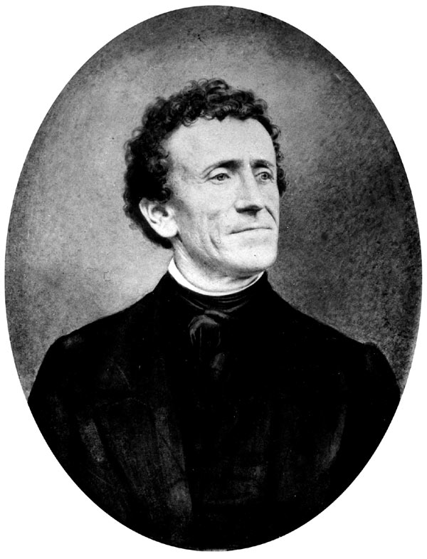 Věnceslav Metelka (1807-1867), Český učitel a houslař.